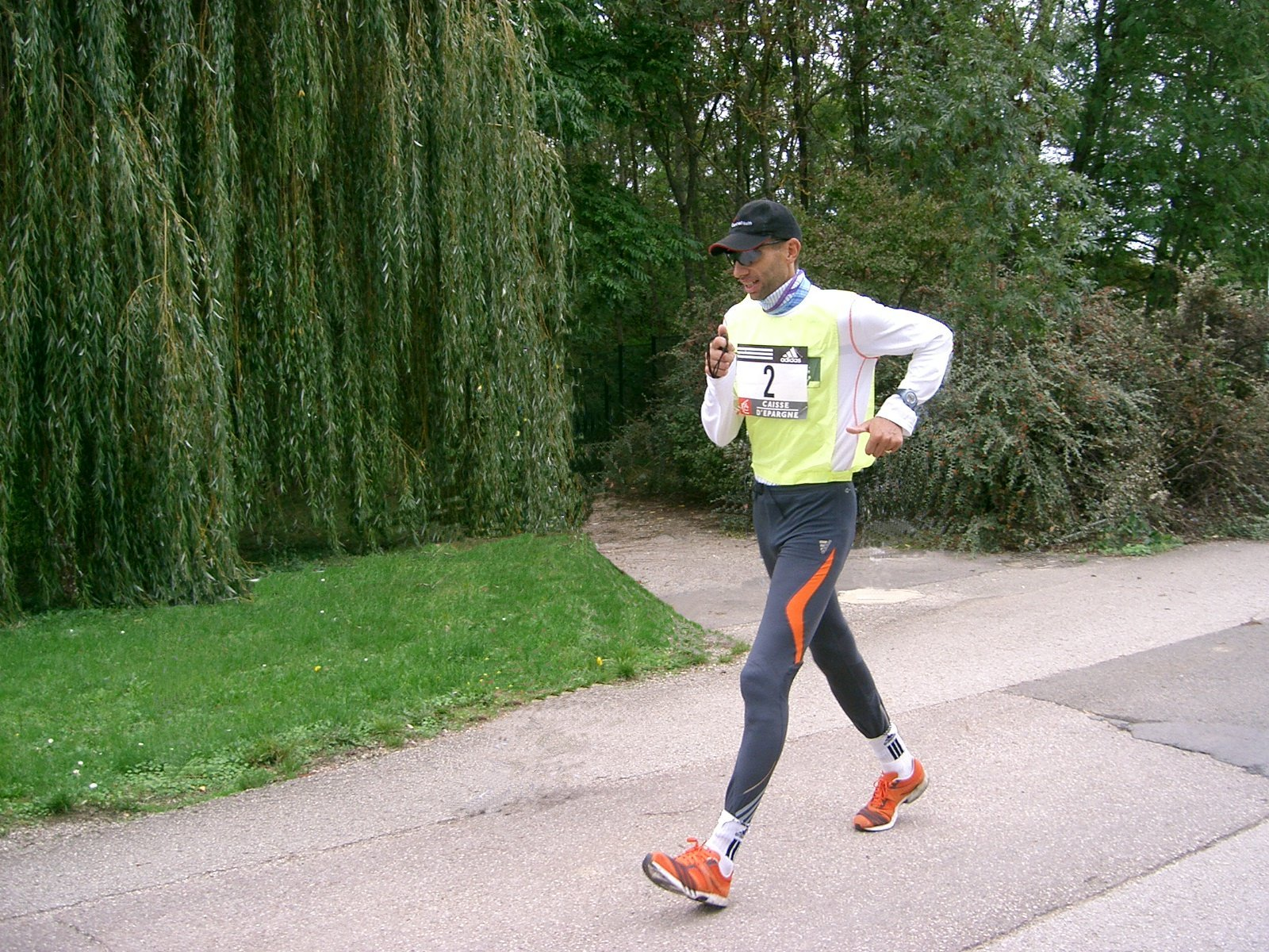 Marcheur en compétition amateur David Régy. self made PRA